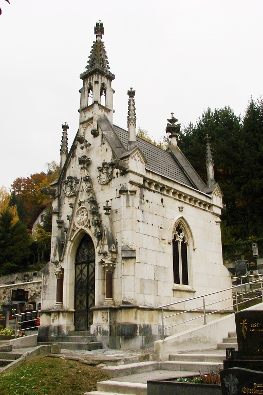 Kaplica księcia Sułkowskiego w Feistritz am Wechsel – projekt: Paul Wasserburger